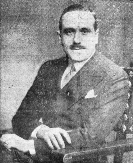 Marcelino Oreja Elosegui